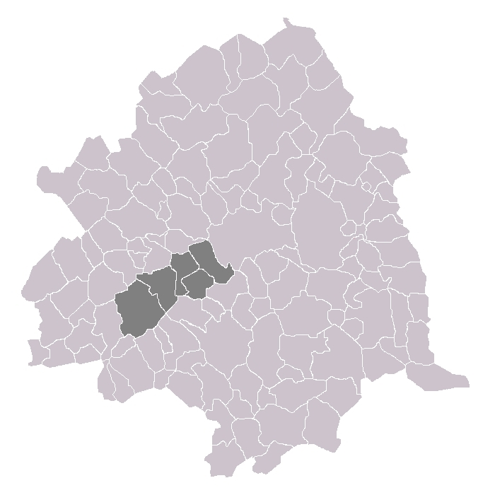 canton d'Haubourdin